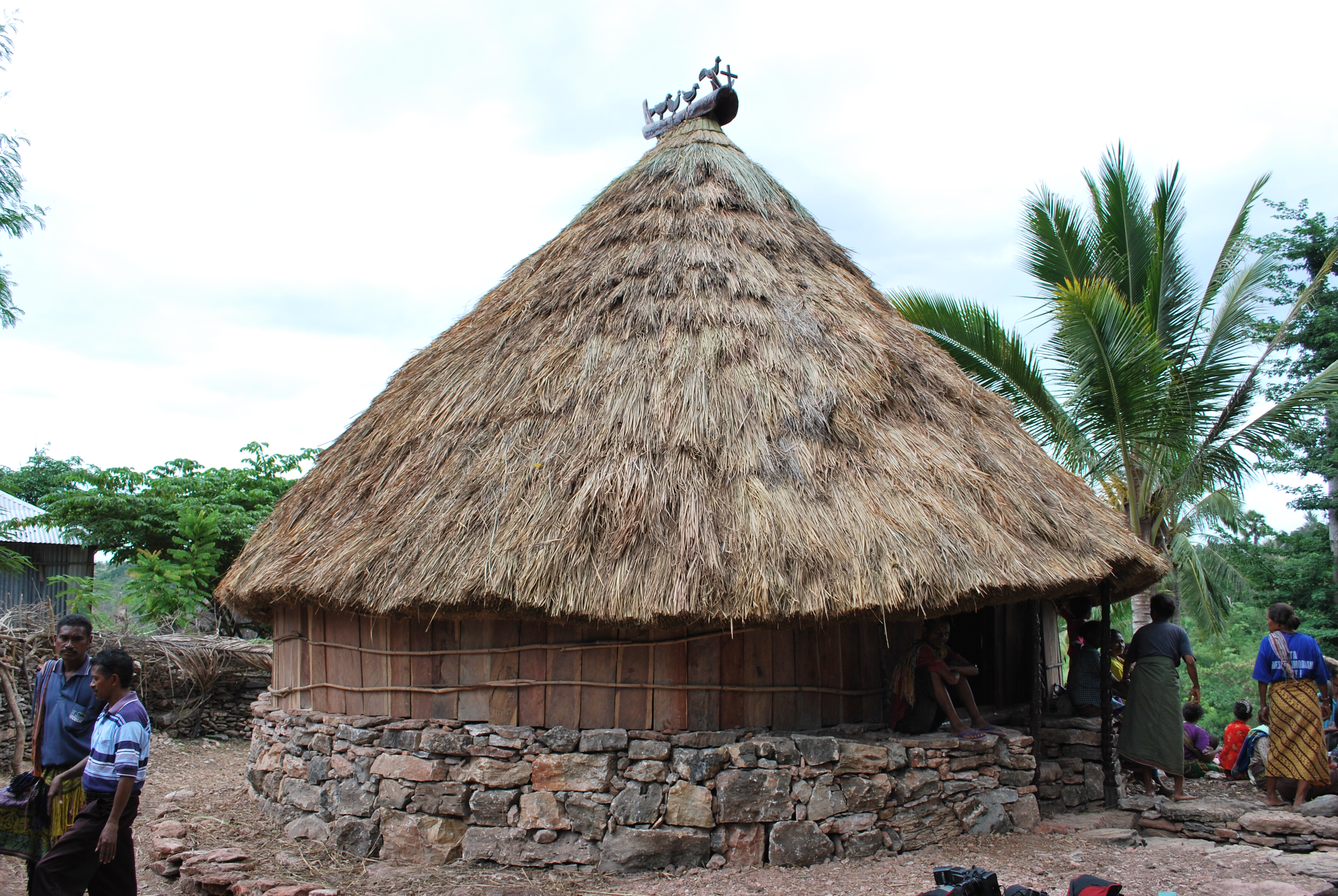 Tumin, Oessilo, Oecusse